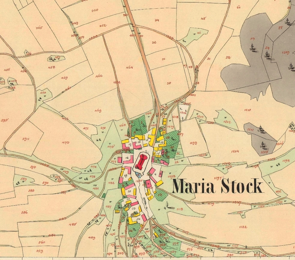 Obec Skoky na výřezu z císařského otisku mapy stabilního katastru z roku 1841.